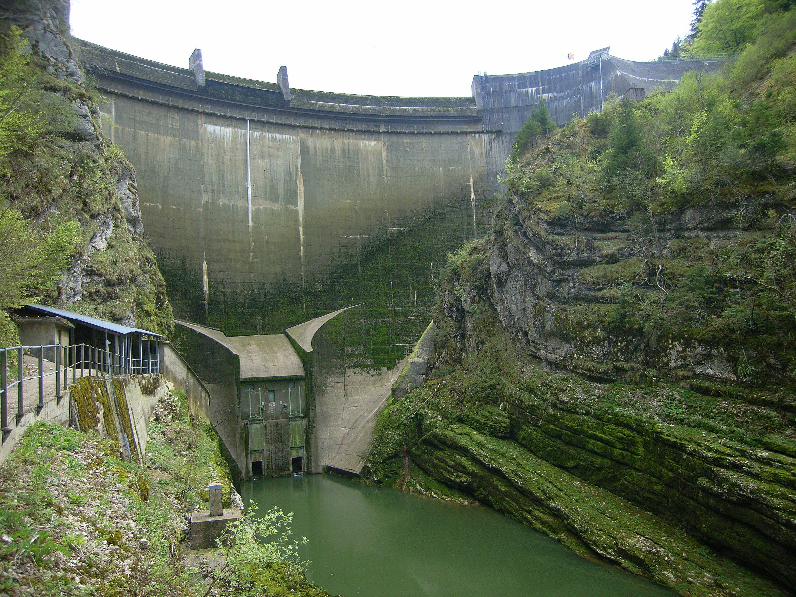 Parc du Doubs Staumauer Lac de Moron